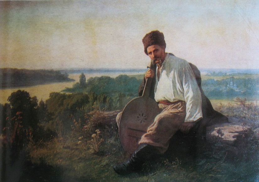 К. Трутовський. Тарас Шевченко з кобзою над Дніпром. 1875 р. Національний музей Тараса Шевченка в Києві.